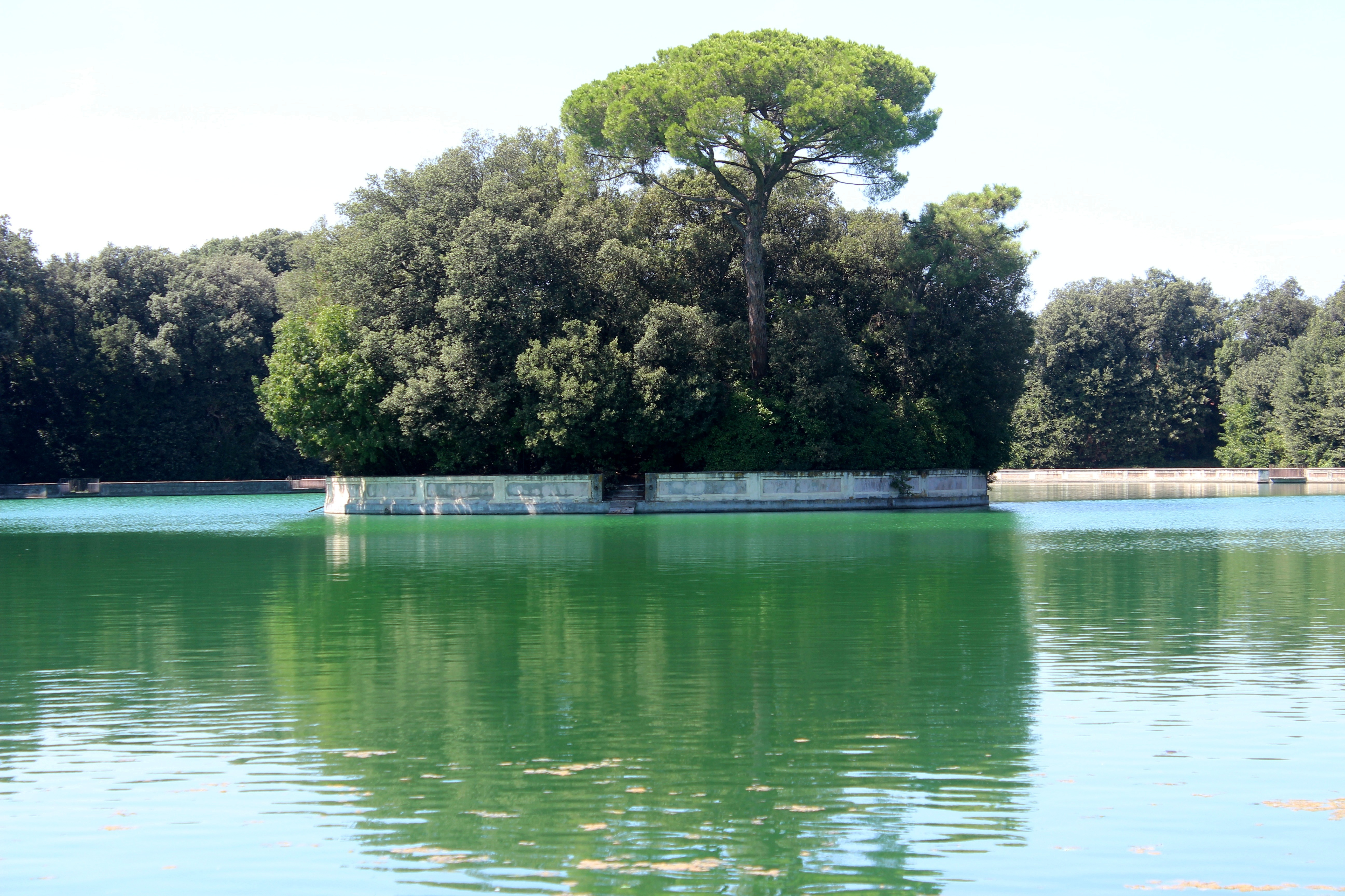 Caserta. Palacio real. Jardín. Peschiera grande.